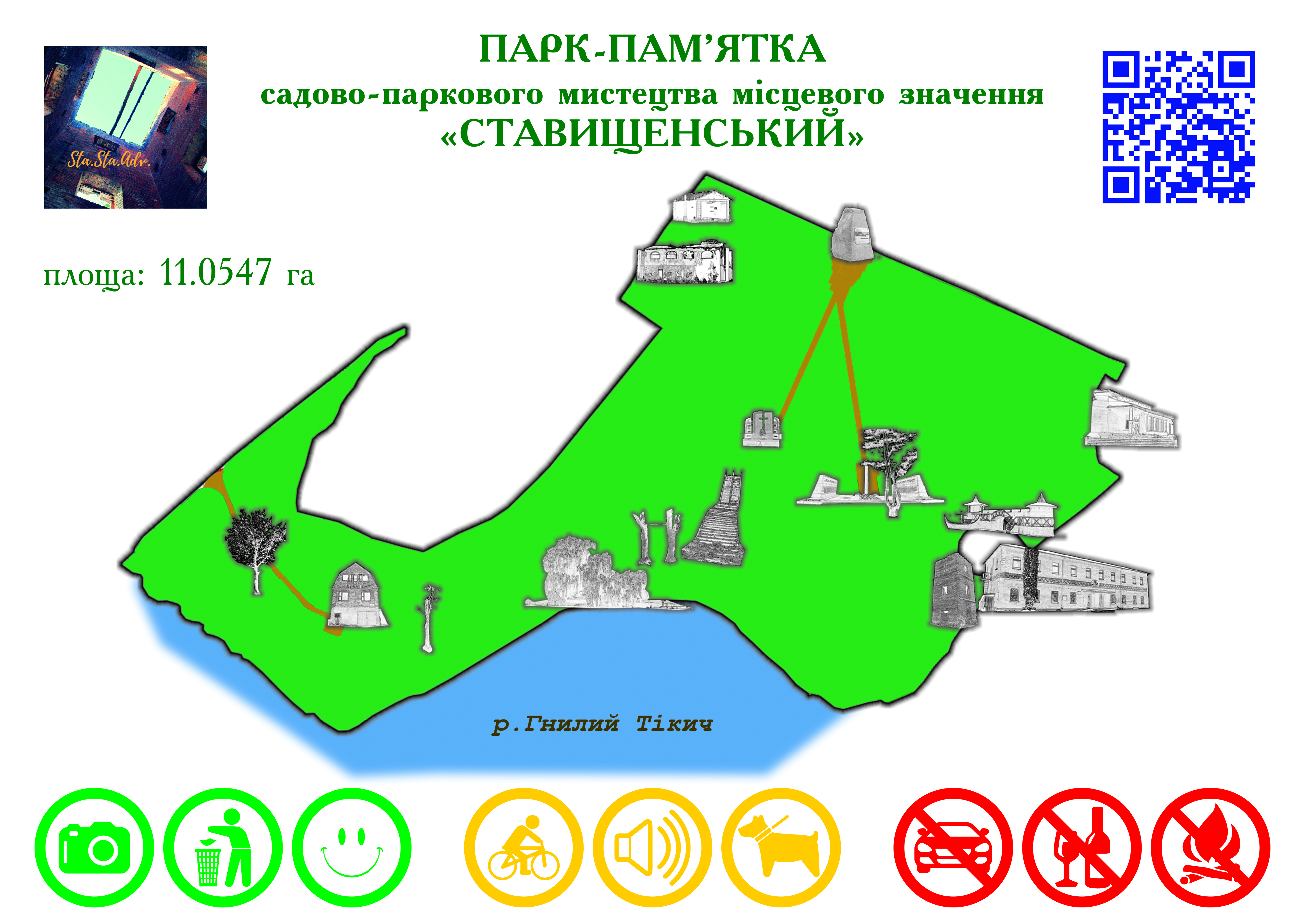 План-схема Парку-пам’ятка садово-паркового мистецтва місцевого значення «Ставищенський», встановлена 17.08.2018